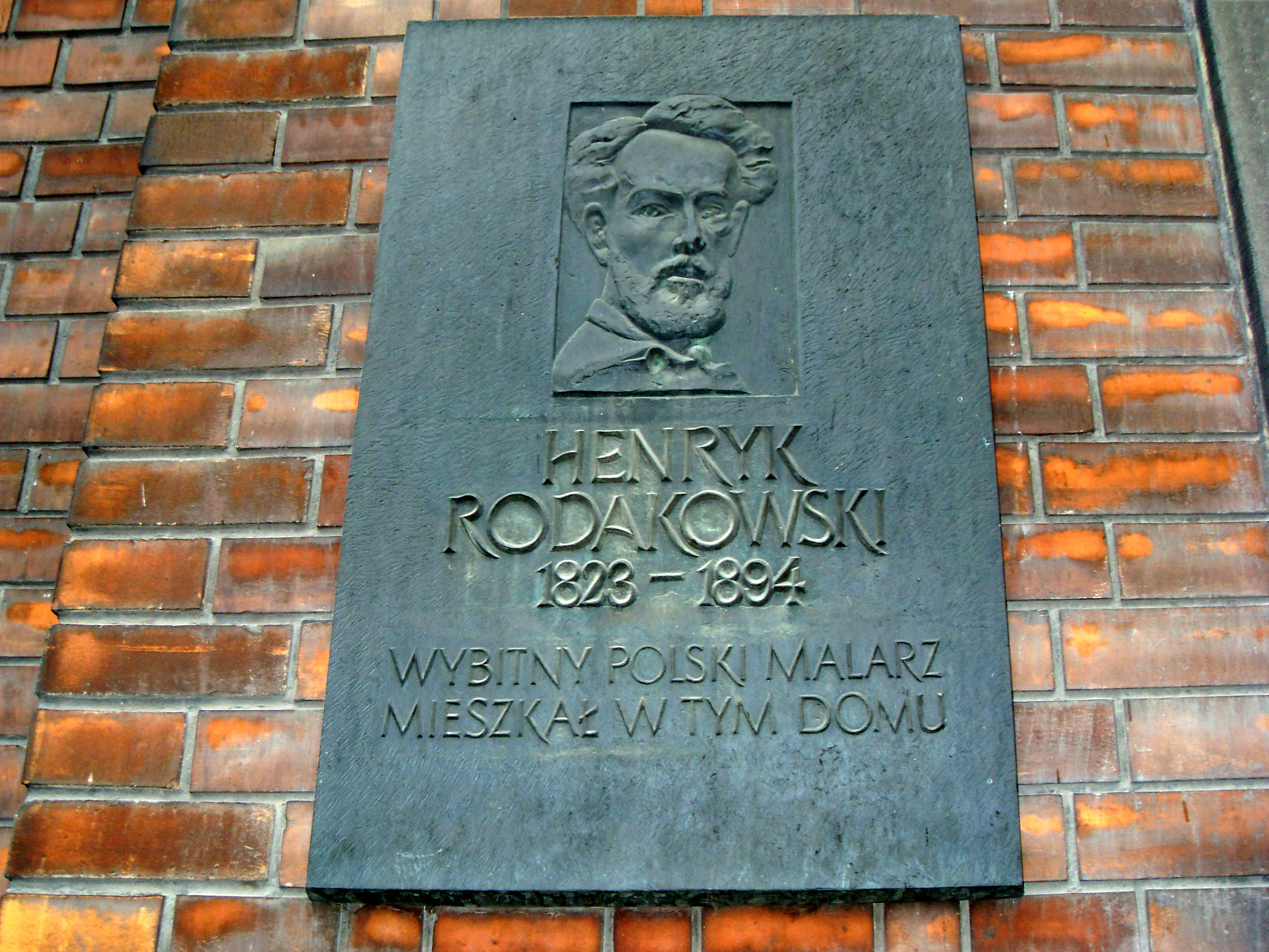 Tablica na kamienicy przy ul. Krupniczej 5 w Krakowie, w której zmarł Henryk Rodakowski.